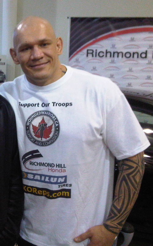 Krzysztof Soszynski